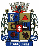 Brasão de armas do município de Ressaquinha, Minas Gerais, Brasil.